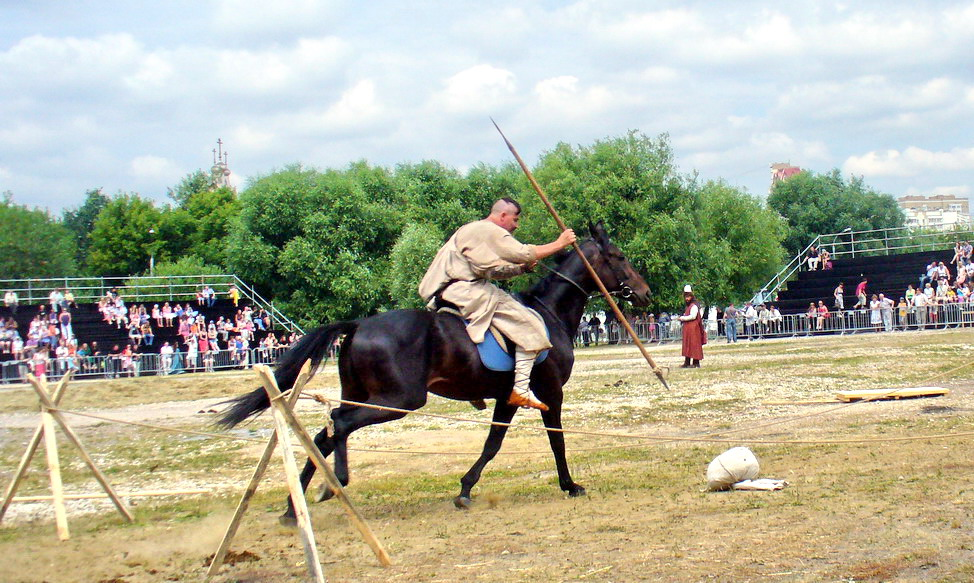 Фестиваль исторической реконструкции "Времена и эпохи" в Коломенском. Всадник наносит удар втоком копья по лежащей на земле мишени.